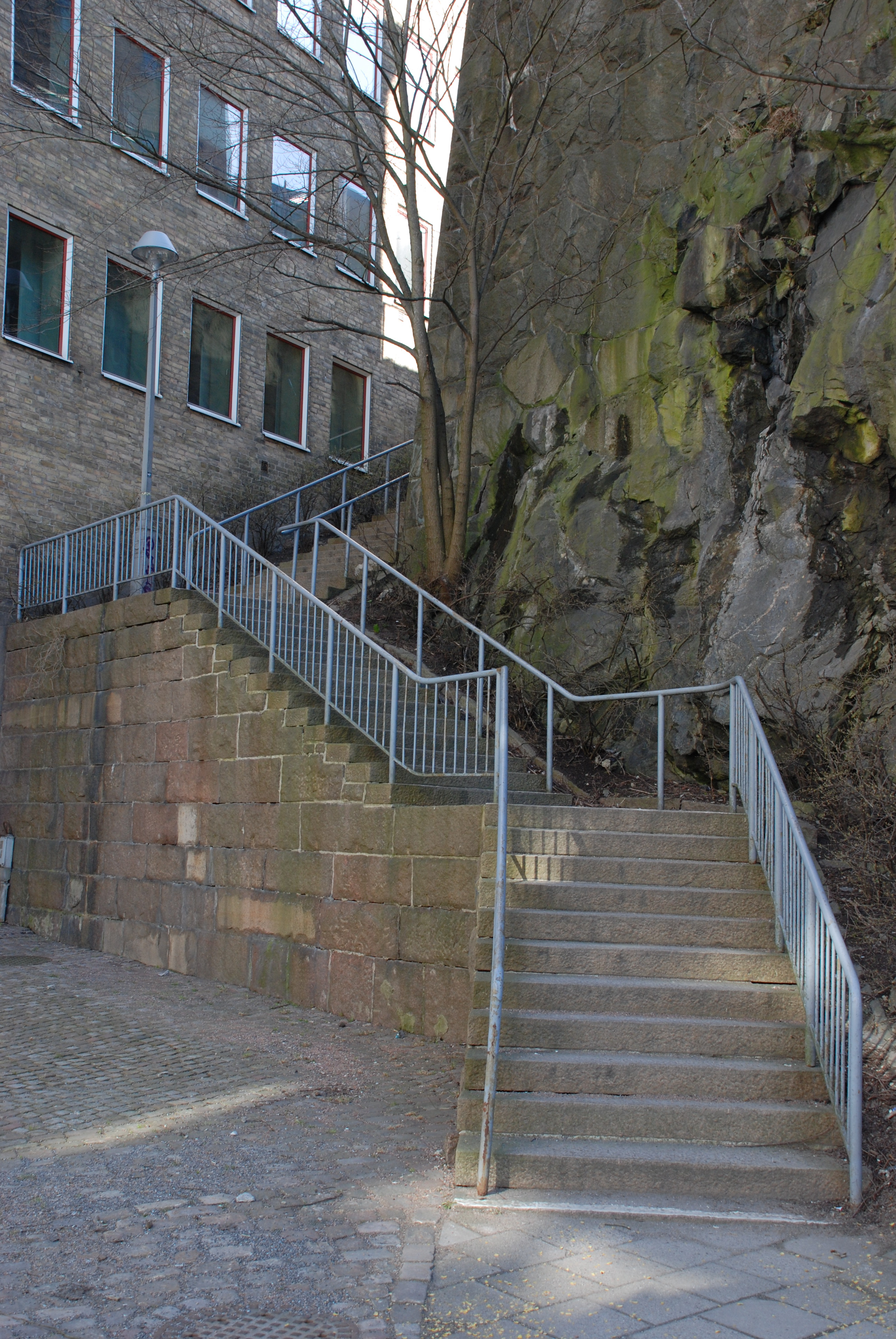 Skräddaregatan i Göteborg sedd från Stora Badhusgatan.